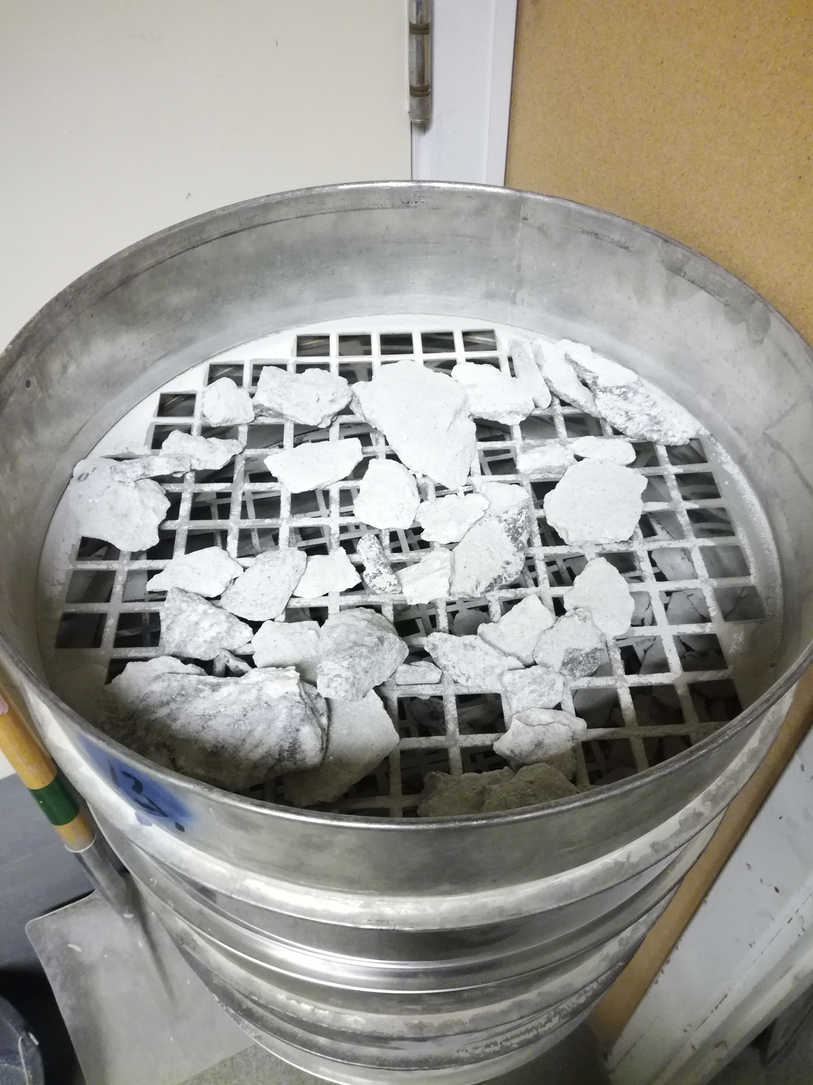 En sikt med maskevidde på 32 mm . Dette vil si at bredden og lengden på de firkantede hullene er 32 mm. Alt av stein og grus som er mindre enn dette vil passere den sikten og lande på den neste , som er 22,4 mm.